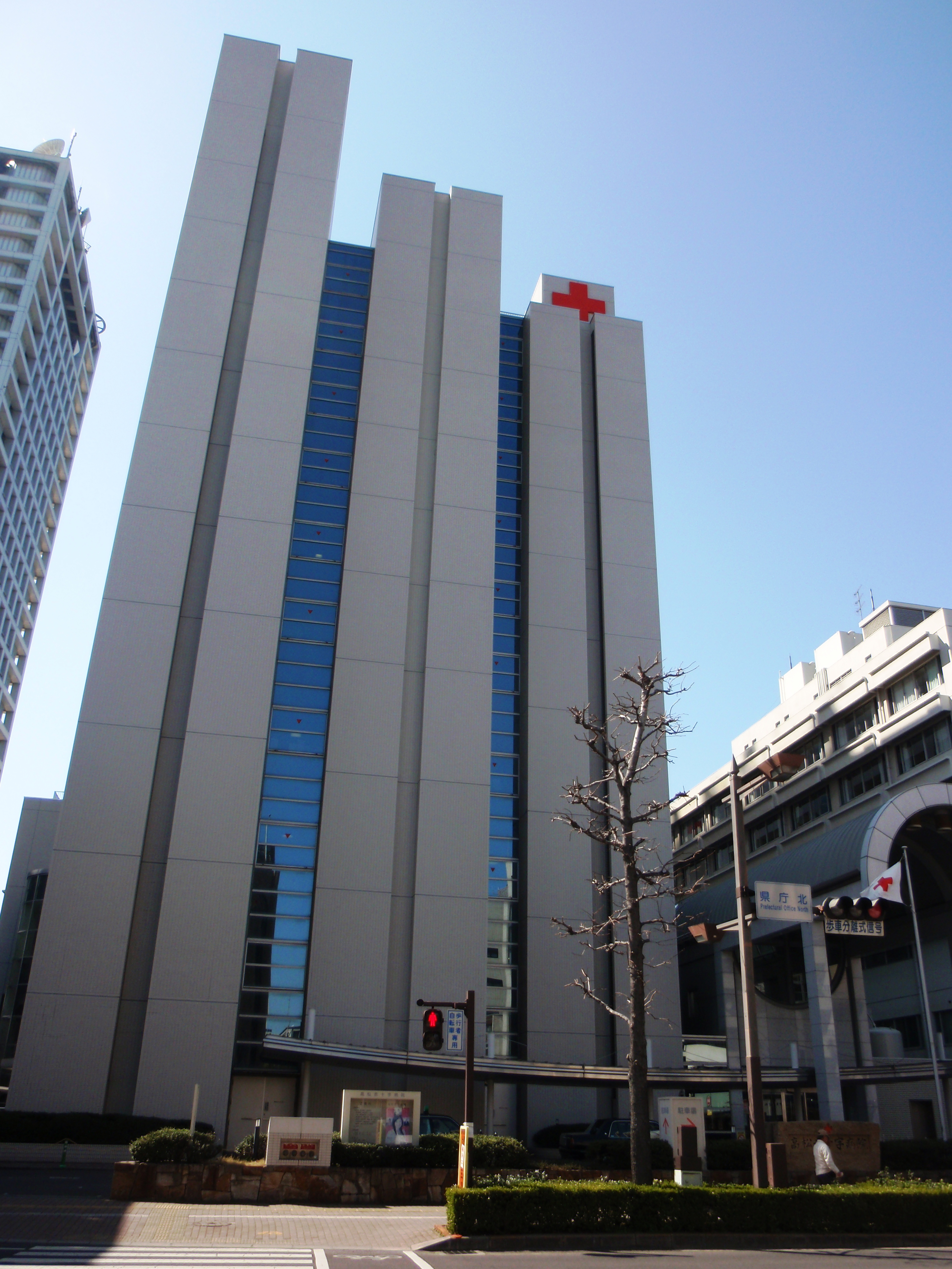 香川県高松市の高松赤十字病院を正面から望む。